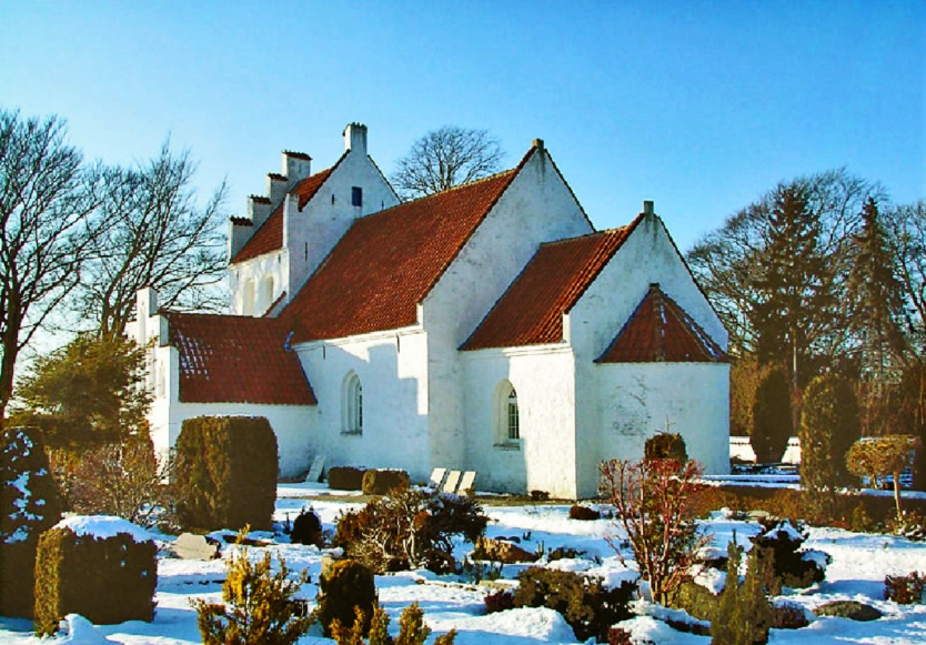 Jyllinge kirke, Roskilde, fra sydøst